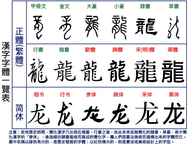 汉字的基本字体：篆、隶、楷、行、草。本图還包括了書法和印刷的美術字体，前者如歐體、顏體，後者如宋體、黑體。. PNG version. 汉字的基本字体：楷行草隶篆，上面一行是简化字，下面一行是繁体字.